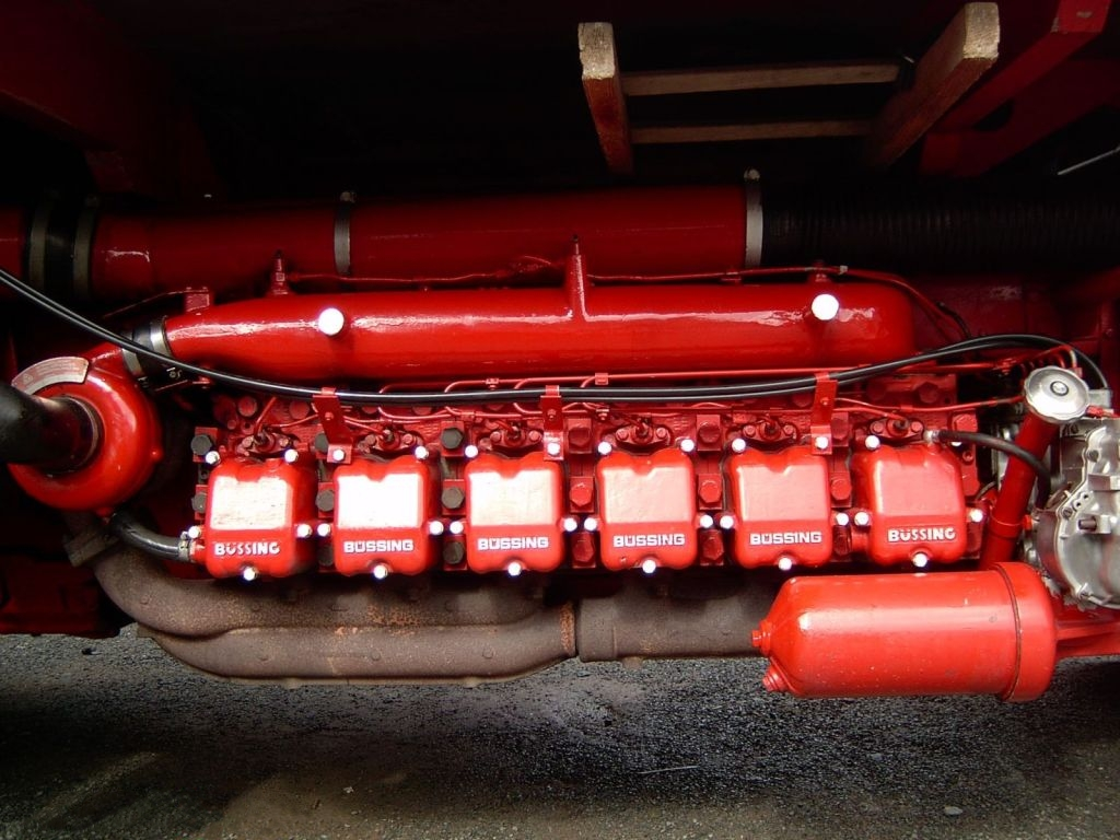 BÜSSING BS 16 L - Unterflur. Dieses Bild habe ich aufgenommen während der 4. Internationalen Nutzfahrzeug-Veteranen-Schau in Weilburg/Lahn am 30. September und 1. Oktober 2006. Die in den Metadaten aufgeführten Angaben über Datum und Uhrzeit der Aufnahme sind nicht korrekt (falsche Kameraeinstellung!).